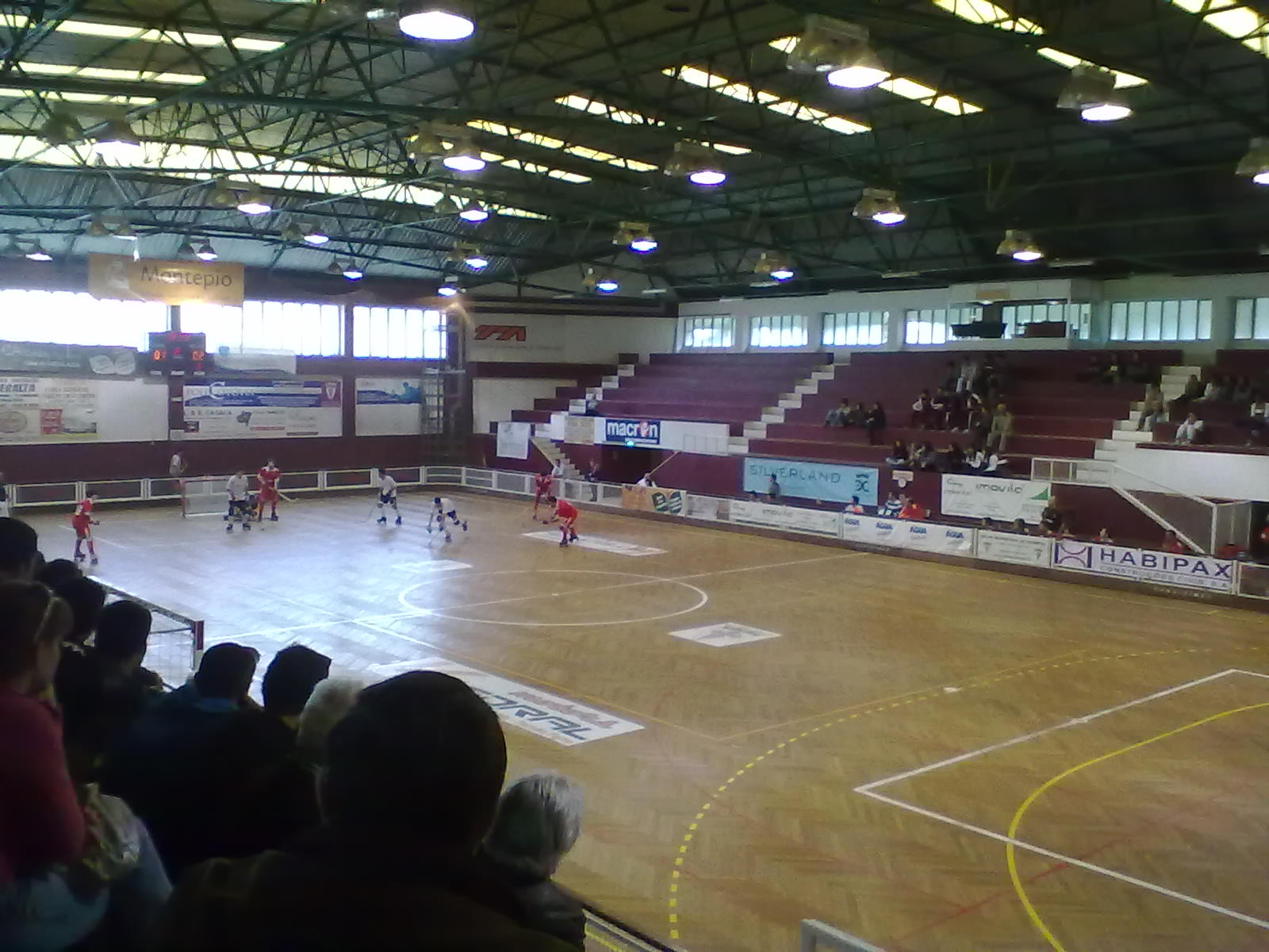 fotografia do jogo de hoquei em patins entre o sesimbra e o benfica (juniores)